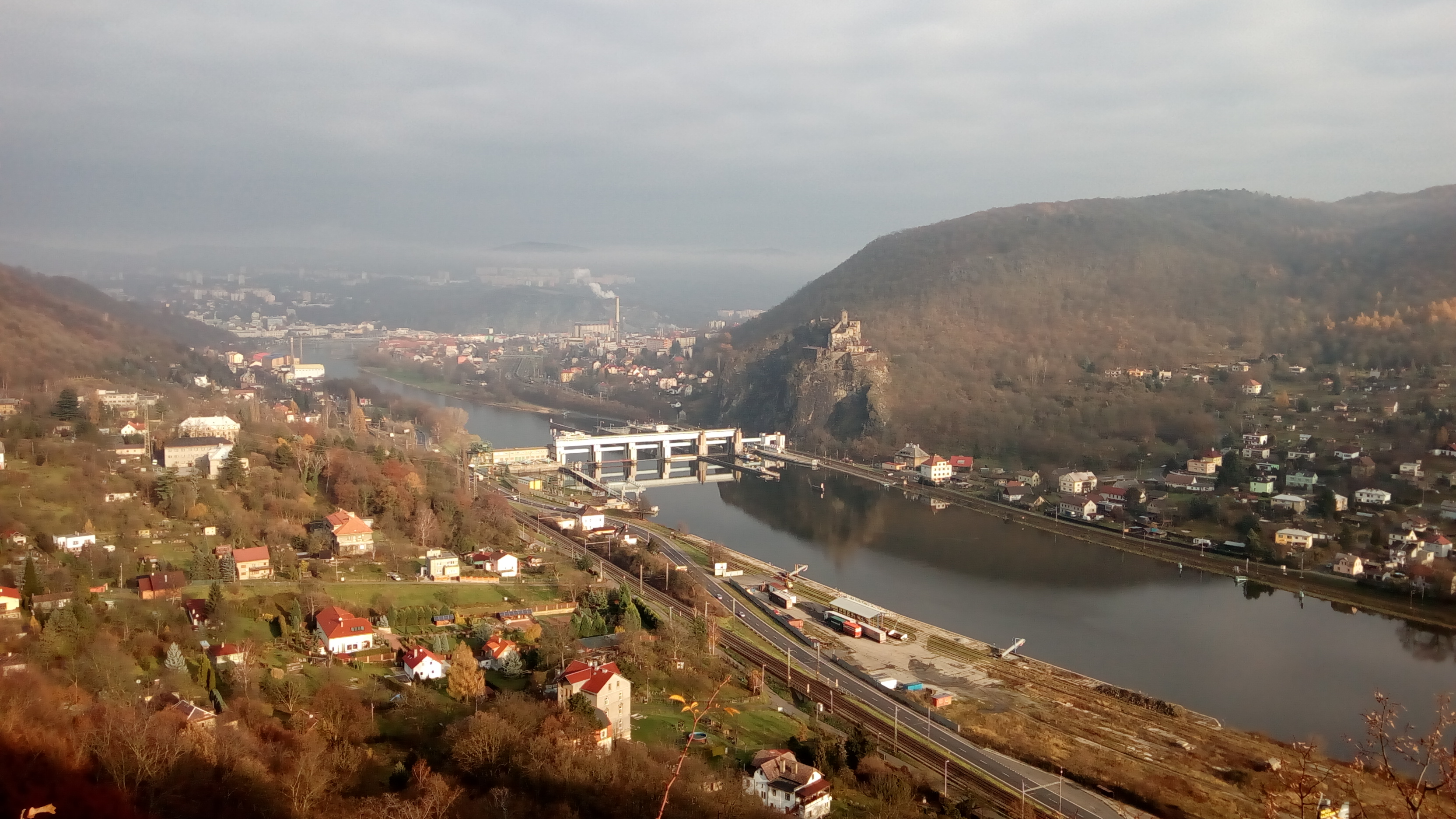 Pohled z vyhlídky na okolí Vrkoče, na hrad Střekov, Masarykova zdymadla a Vaňov